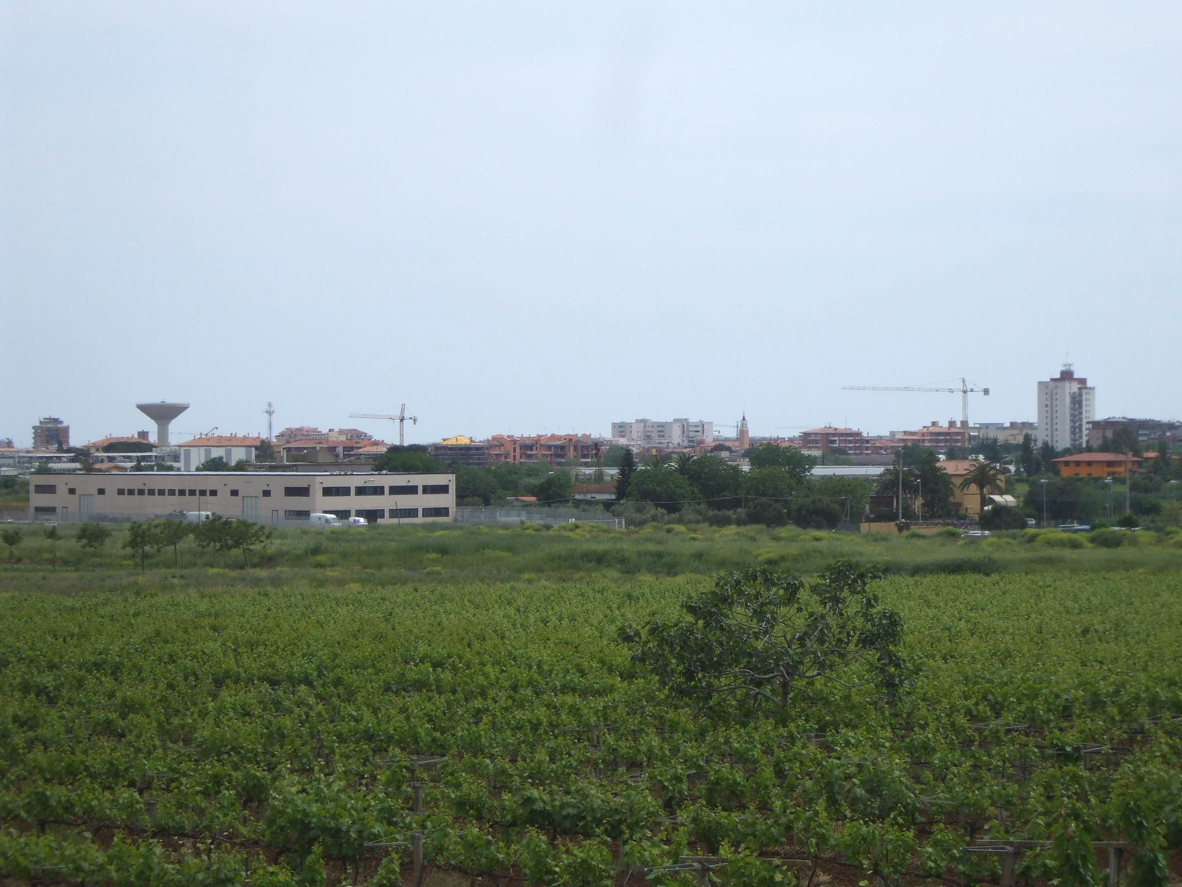 Aprilia (Lt) - panorama